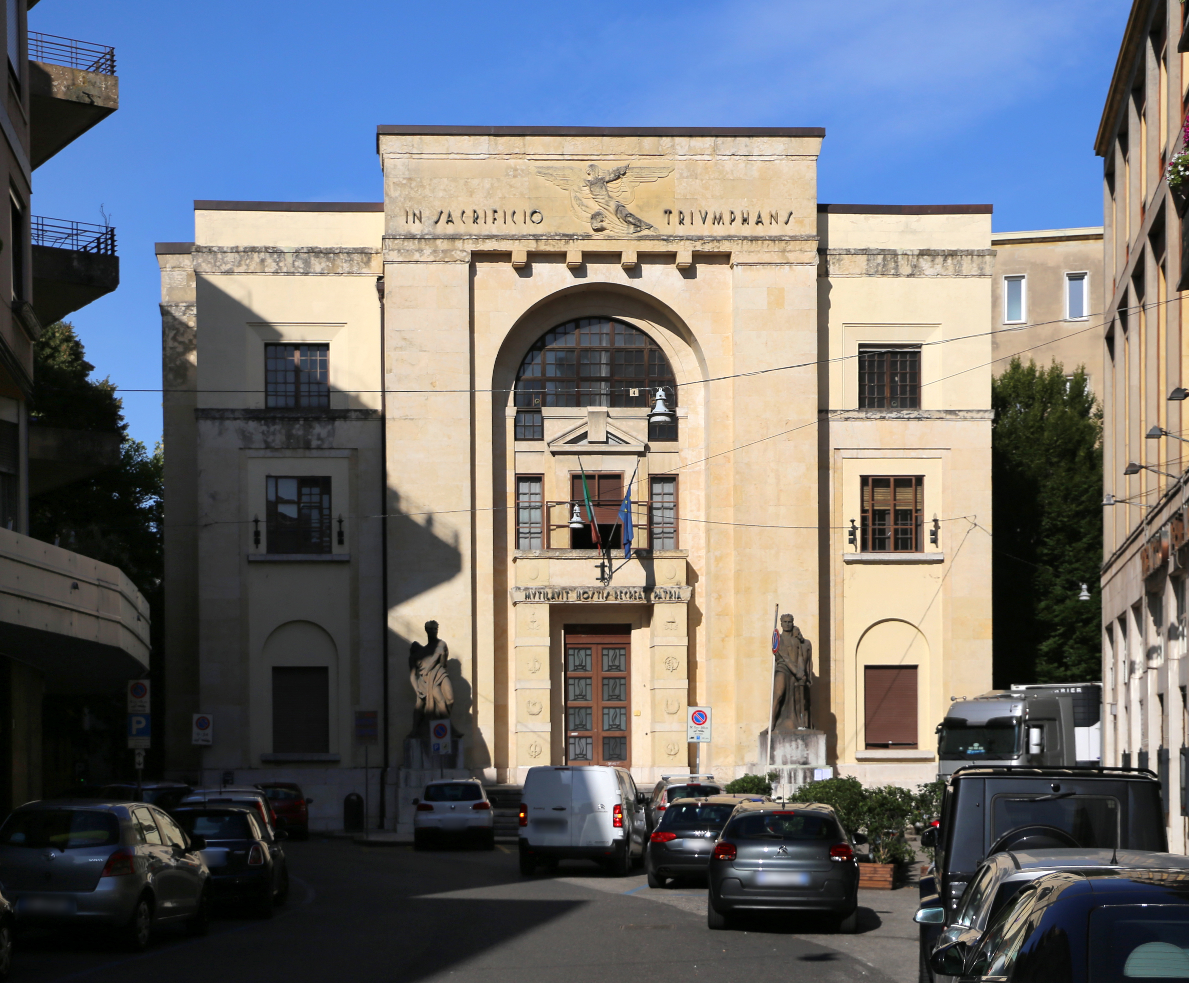 Casa del Mutilato This is a photo of a monument which is part of cultural heritage of Italy.